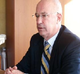 Portrait de Christian Jeanjean, maire de Palavas-les-Flots. Christian Jeanjean (1942–) DescriptionFrench politicianDate of birth16 February 1942Location of birthMontpellierWork locationPalavas-les-Flots, MontpellierAuthority control : Q2412384 VIAF: 11485278 ISNI: 0000 0000 2818 4076 LCCN: n91063363 GND: 1074375475 SUDOC: 124987958 WorldCat